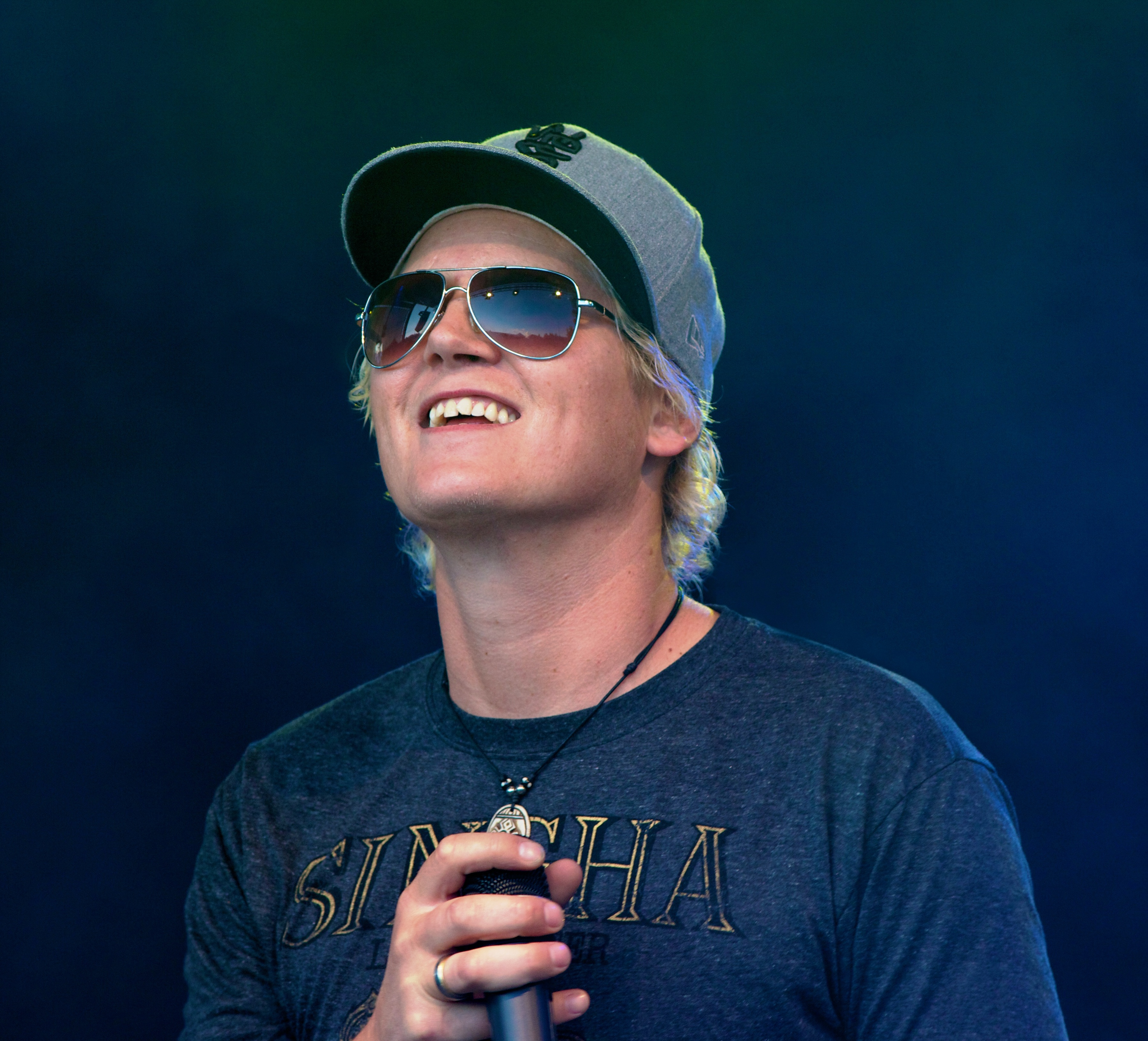 Øyvind "Vinni" Sauvik. Norwegian rap-artist. Taken at Sluserock 2011, Lunde Telemark